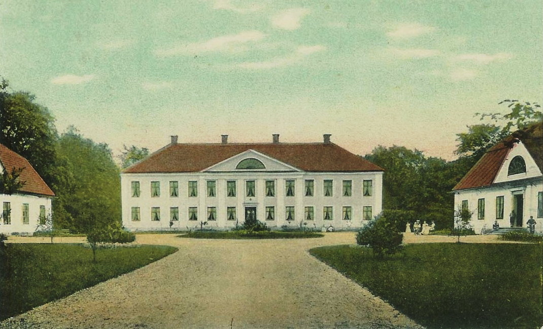 Hagbyberga, Björkvik, 1920